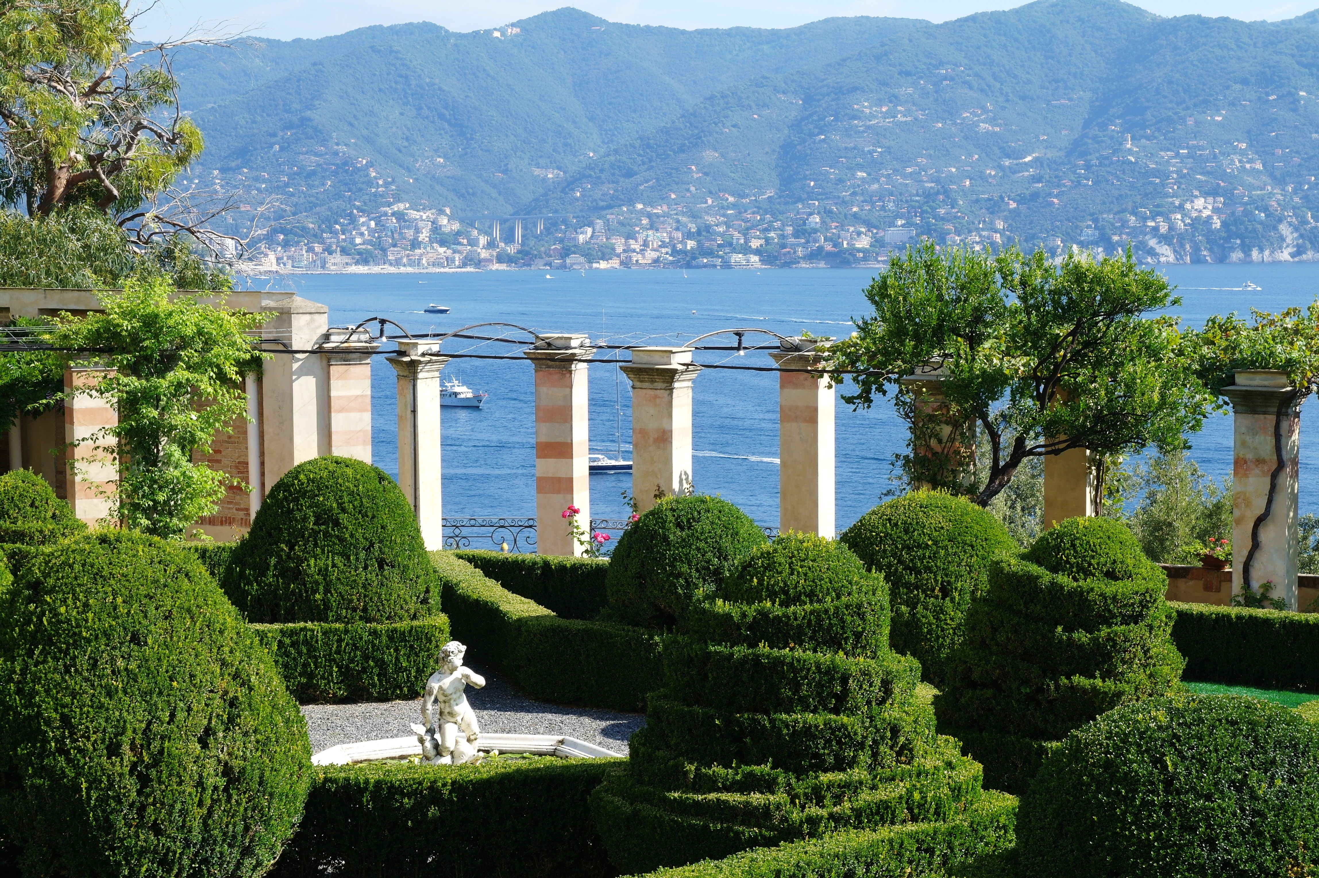 La Cervara - Abbazia di San Girolamo al Monte di Portofino This is a photo of a monument which is part of cultural heritage of Italy.